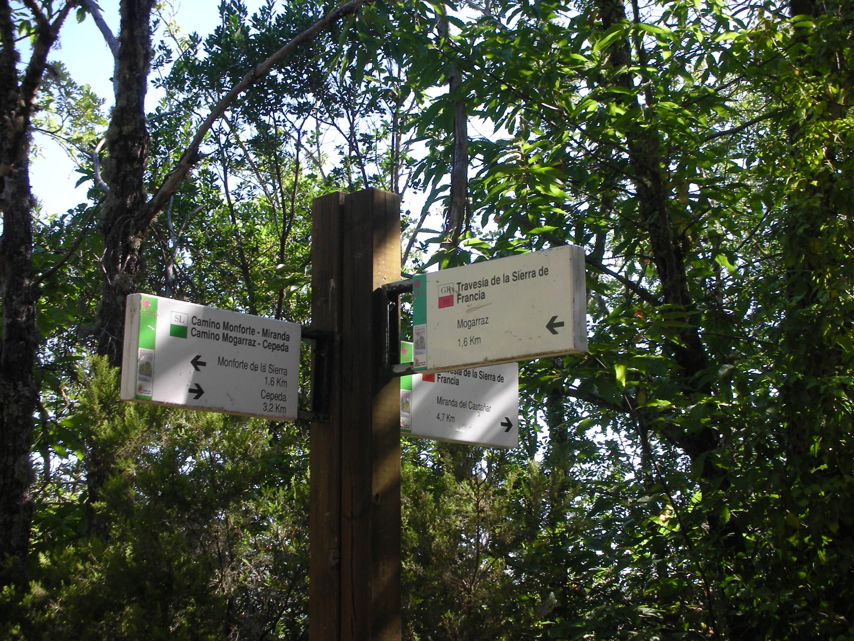 Balisage de sentiers autour de la commune de Sotoserrano en Espagne